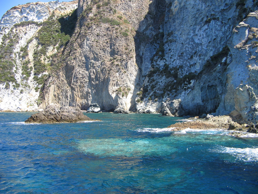 Ponza (LT Latina), Lazio, Italia